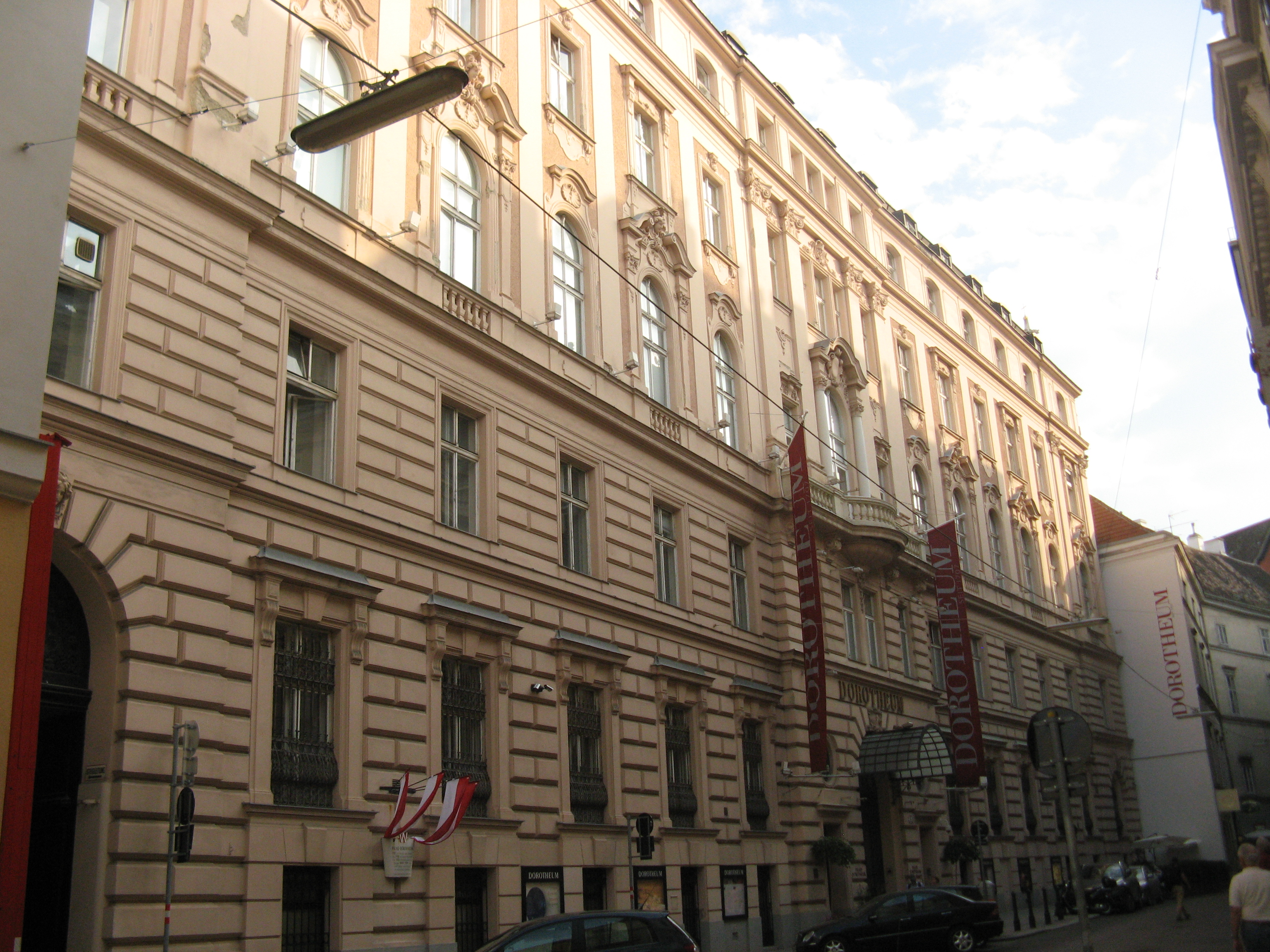 Palais Dorotheum, Dorotheergasse 17, Wien-Innere Stadt